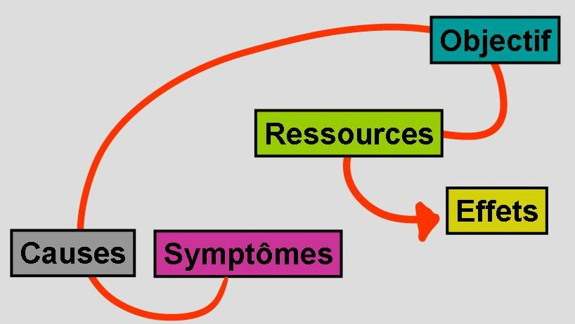 Schéma du modèle SCORE employé en PNL et issu de la psychologie cognitive.